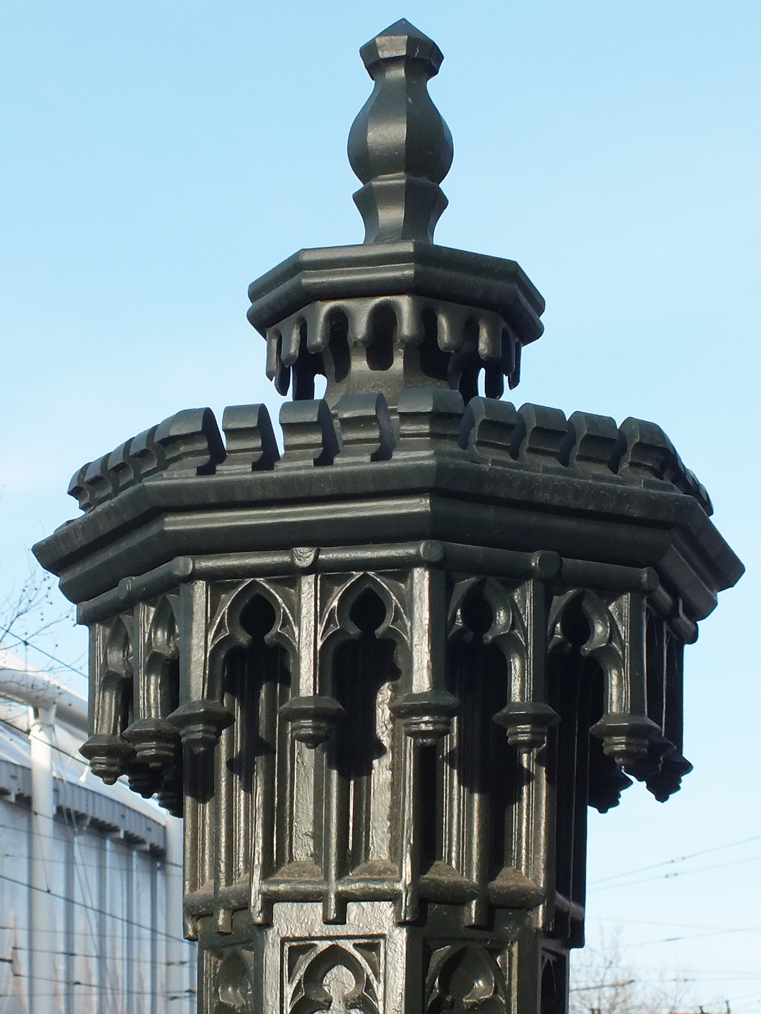 Oberteil der Handschwengelpumpe Typ Gotik in der Pfaffendorfer Straße in Leipzig